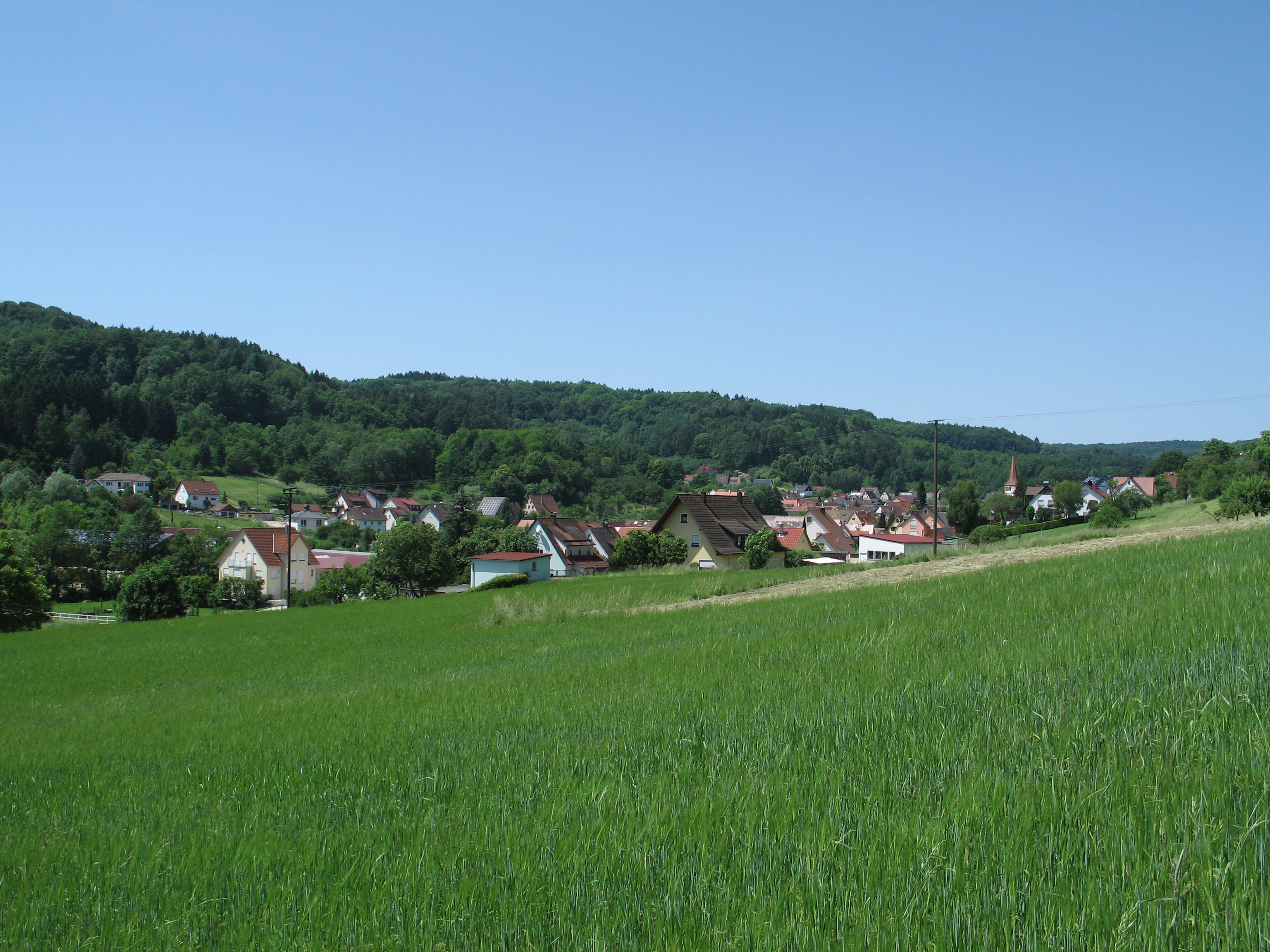 Ortsansicht Kirchensittenbach